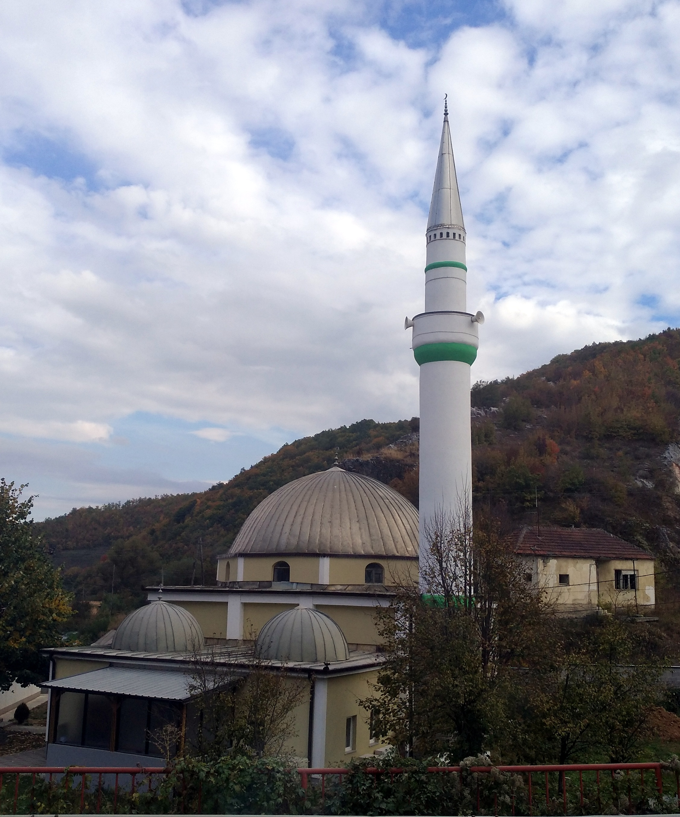 La mosquée de Caralevë (Crnoljevo en serbe) au Kosovo.